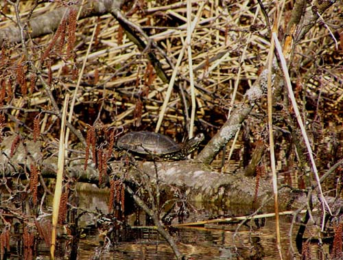 Emys orbicularis